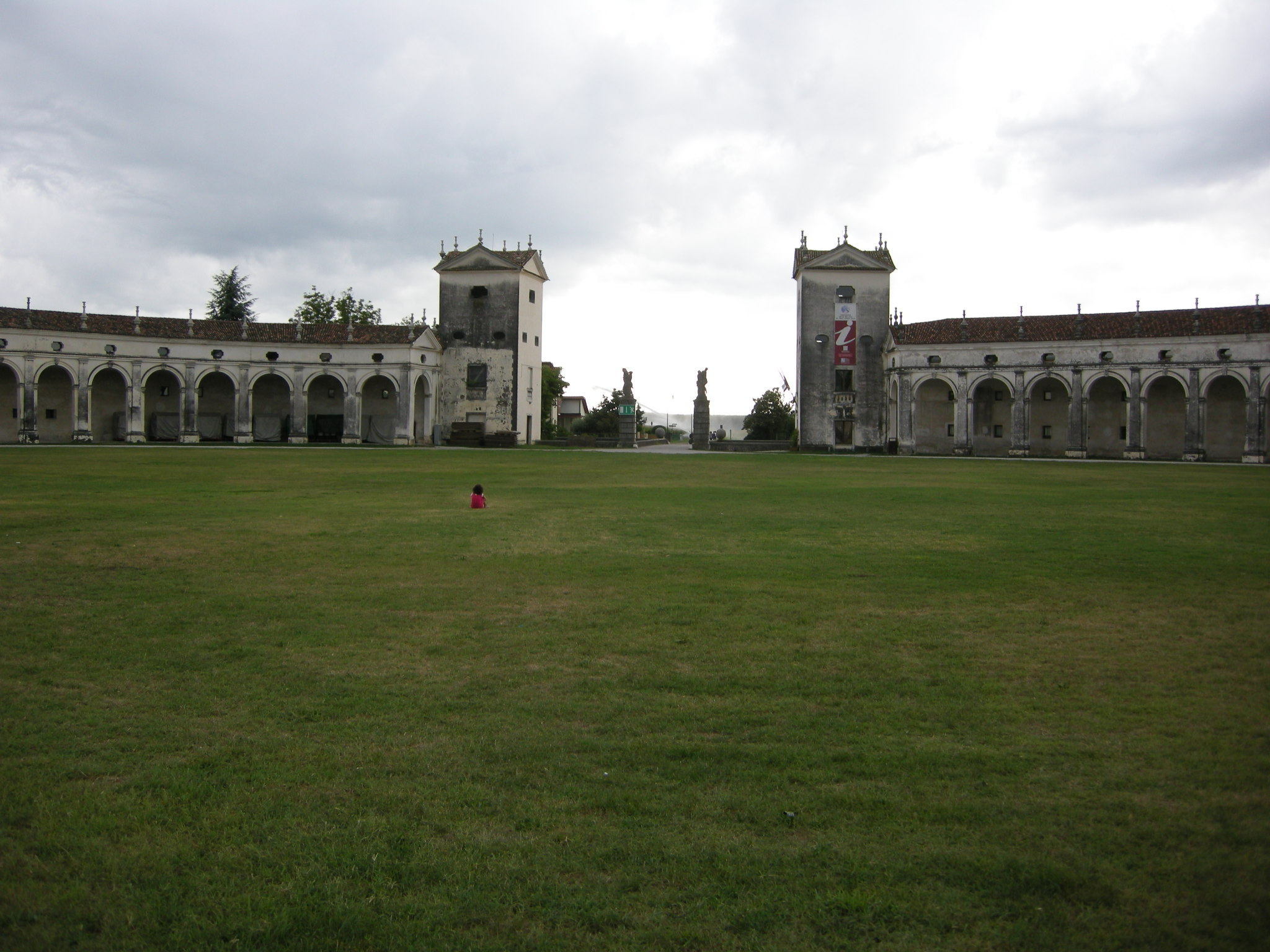 Villa manin, esedra